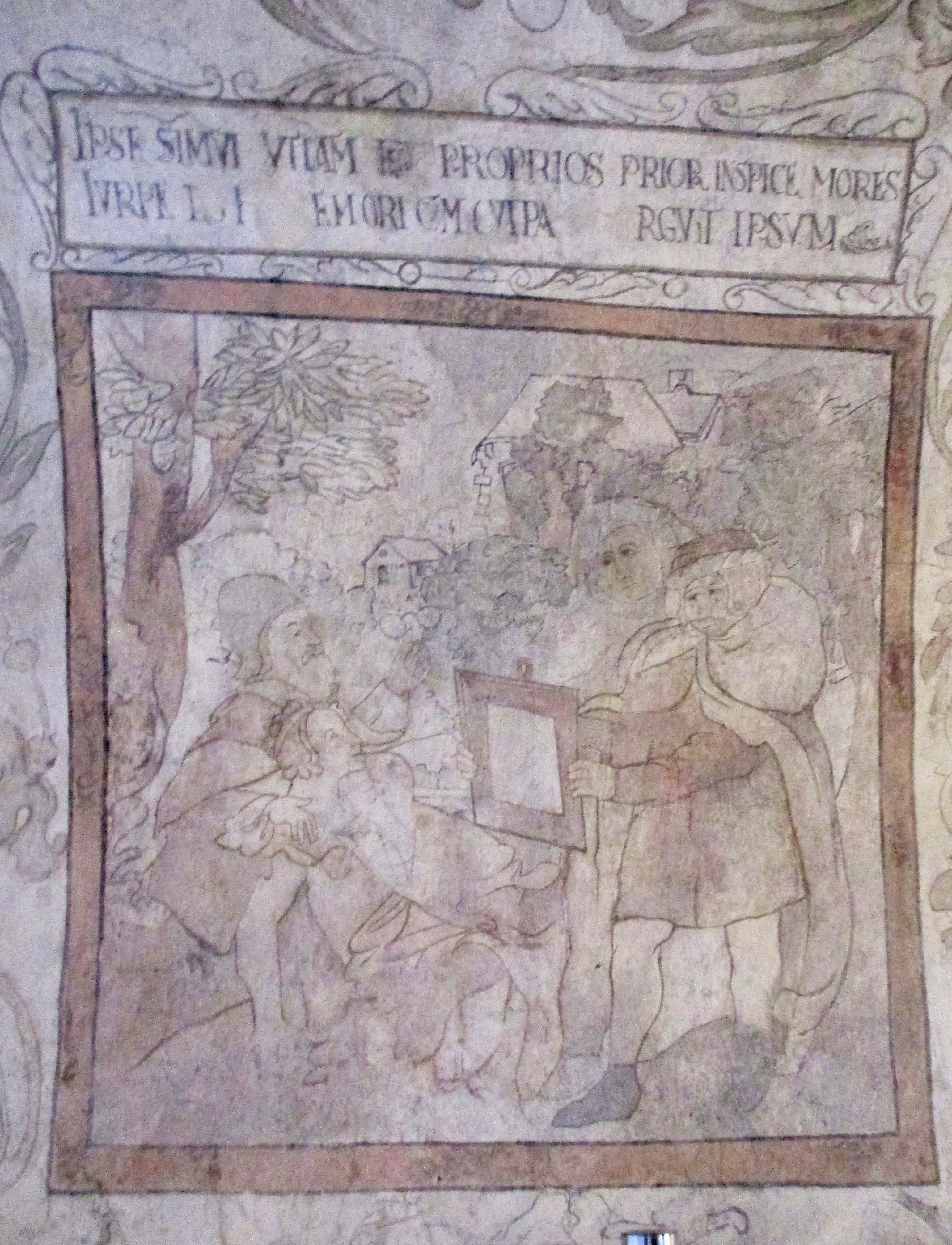 Jeden z obrazów w piwnicy pod Fortuną w Lublinie